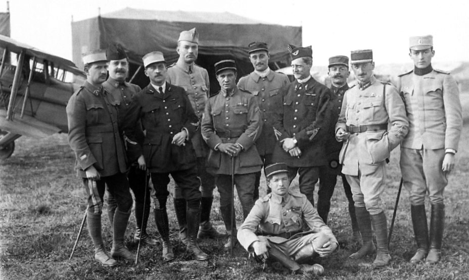 Groupe de pilotes des escadrilles SPA 3, SPA 26 et SPA 103 sur le terrain d'Hétomesnil, le 8 mai 1918 - Assis au premier plan : René Fonck (SPA 103) - Au second plan, de gauche à droite : X - X - Ltt Benjamin Bozon-Verduraz (SPA 3) - X - Ltt Joseph Battle (cdt SPA 103) - Cne Louis Bucquet (pilote SPA 3) - Cne de Sevin (Cdt SPA 26) - X - Cne Georges Raymond (cdt SPA 3) - Ltt Sondermayer (pilote serbe de la SPA 3)